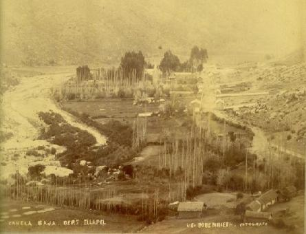 foto de canela baja de 1870